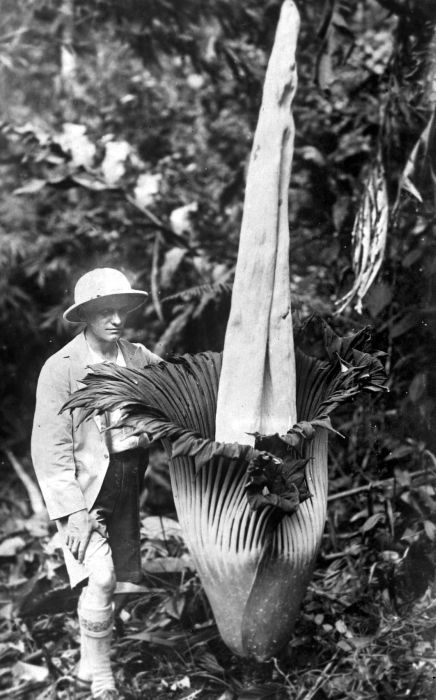 Repronegatief. Een man staat naast een reusachtige bloem van een Amorphophallus titanum Becc. te Moeara Anam, Zuid-Sumatra